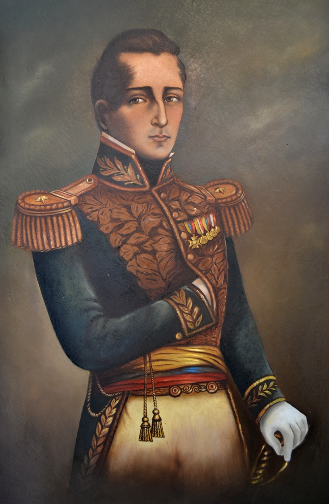 Imagen tomada de